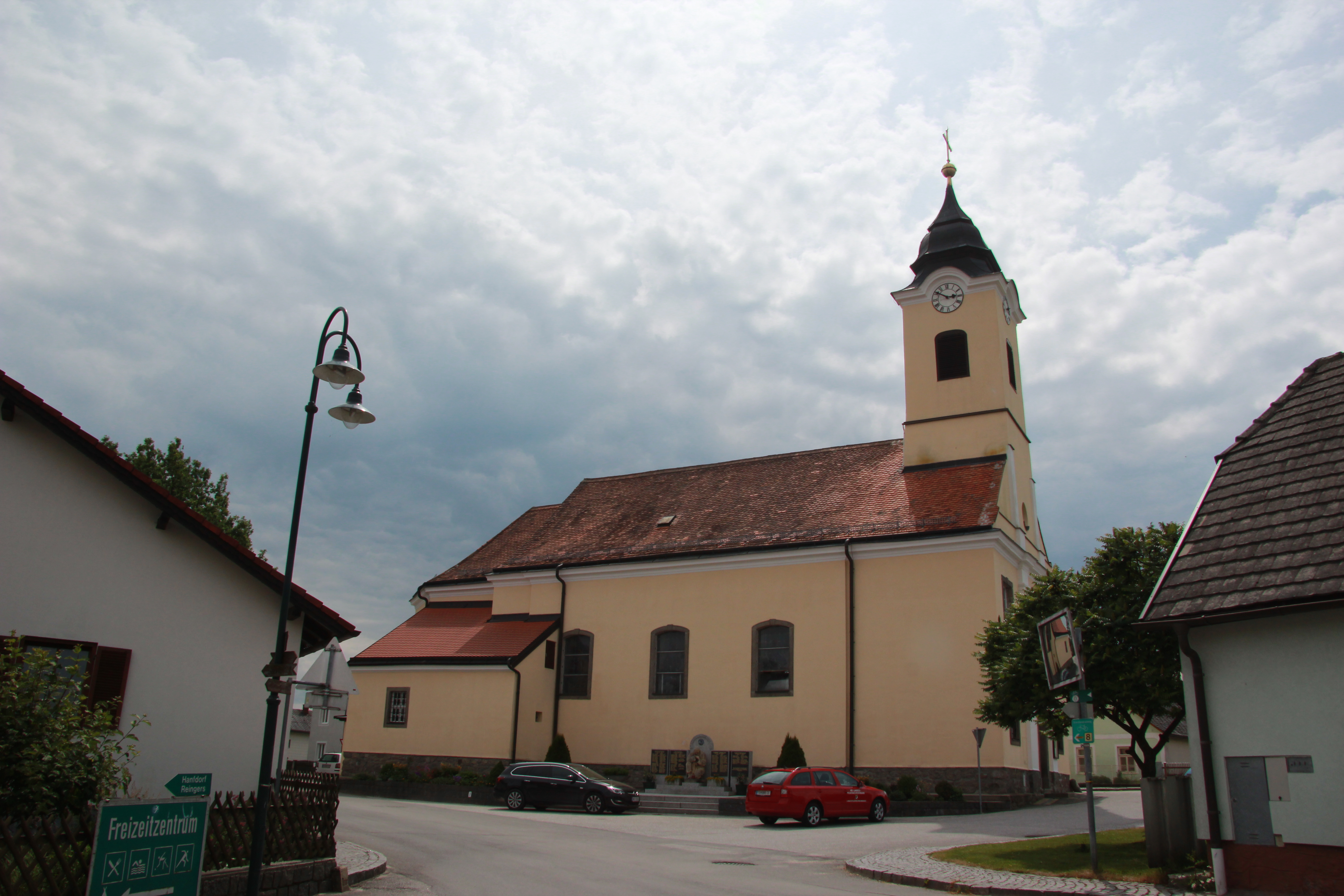 Reingers im niederösterreichischen Waldviertel